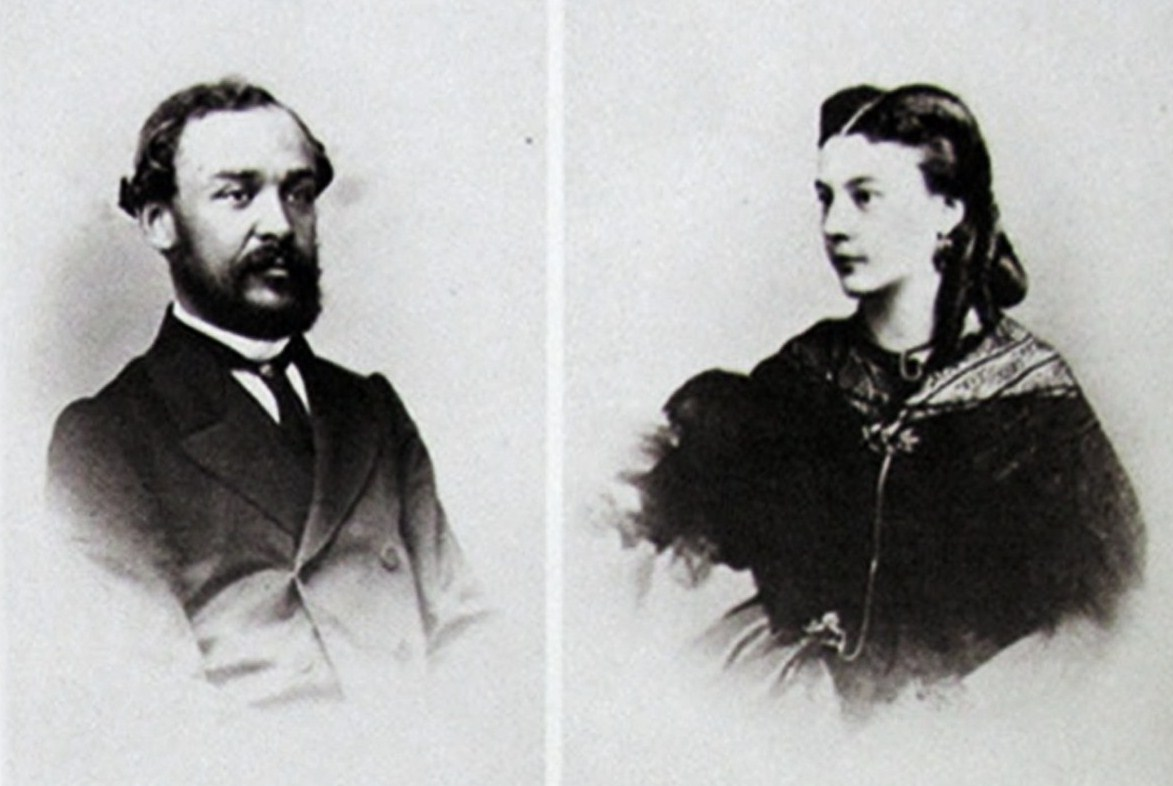 Князь Фёдор Иванович Паскевич (1823—1903) с женой Ириной Ивановной, ур. Воронцовой(1835—1925)